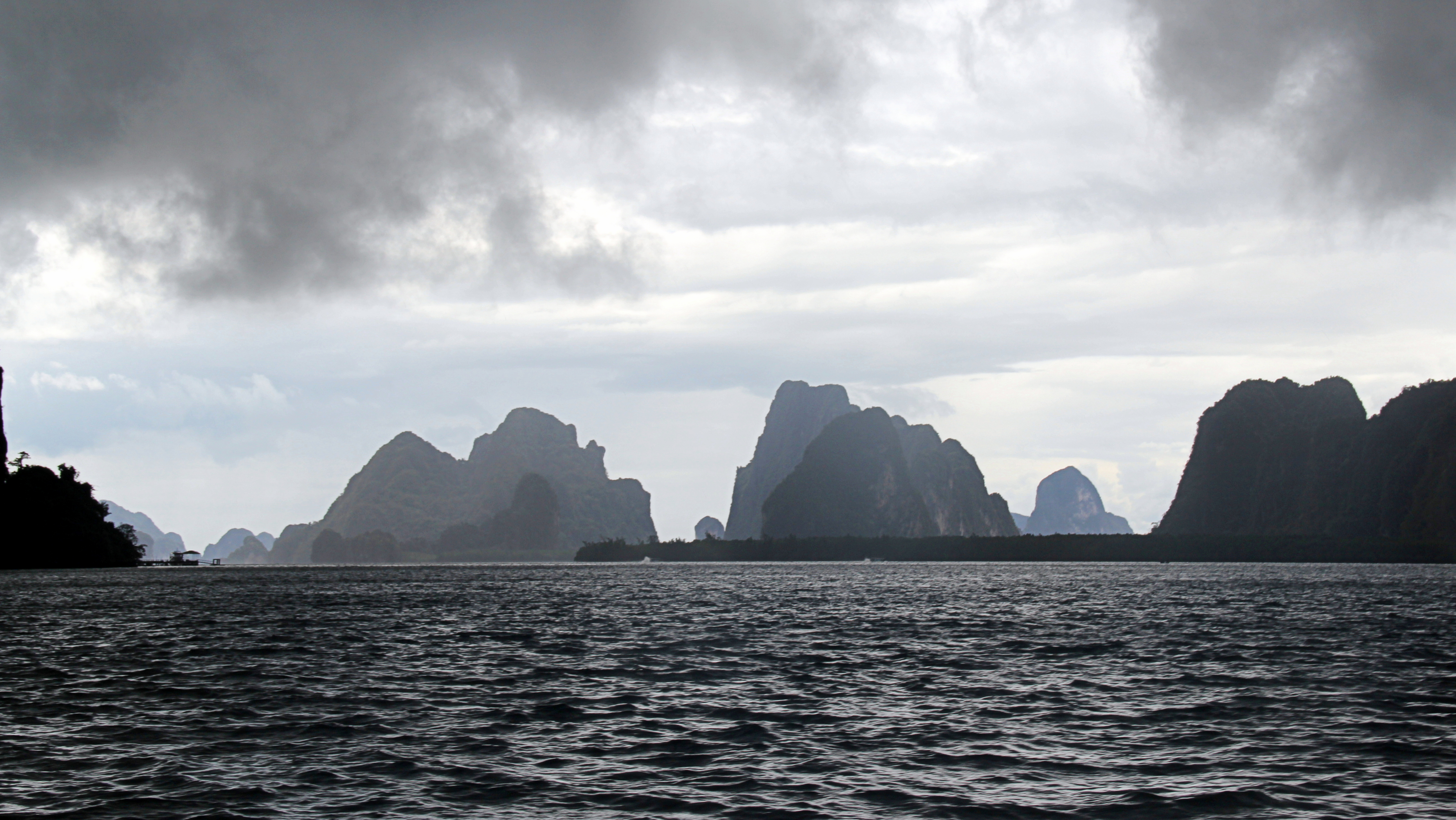 Ao Phang Nga National Park